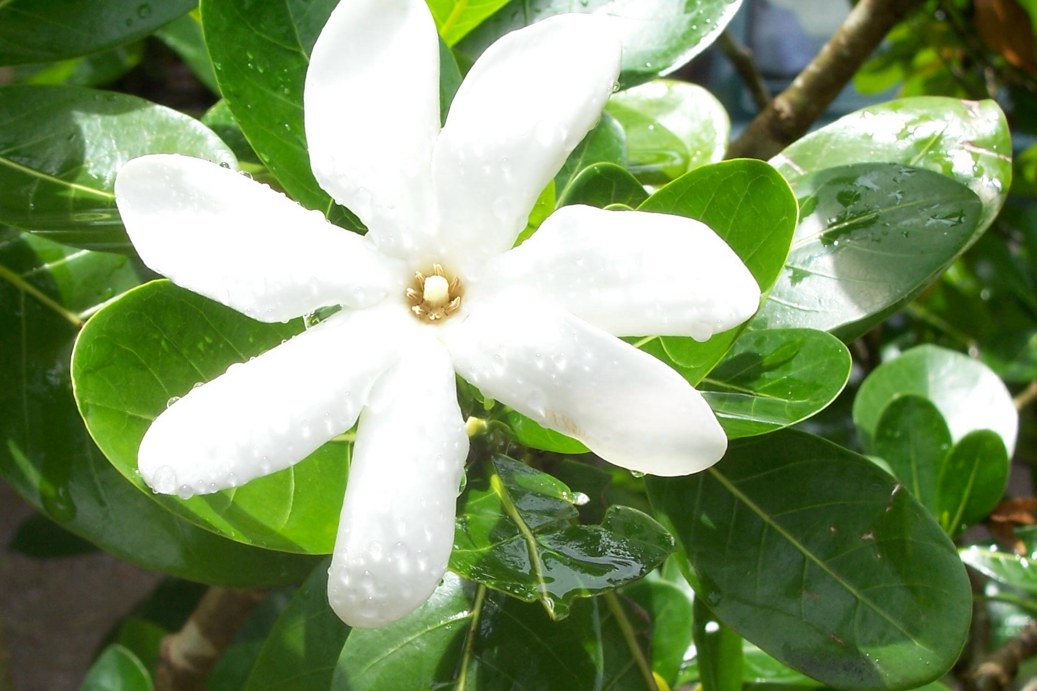 Gardenia taitensis (Tiare Maori)